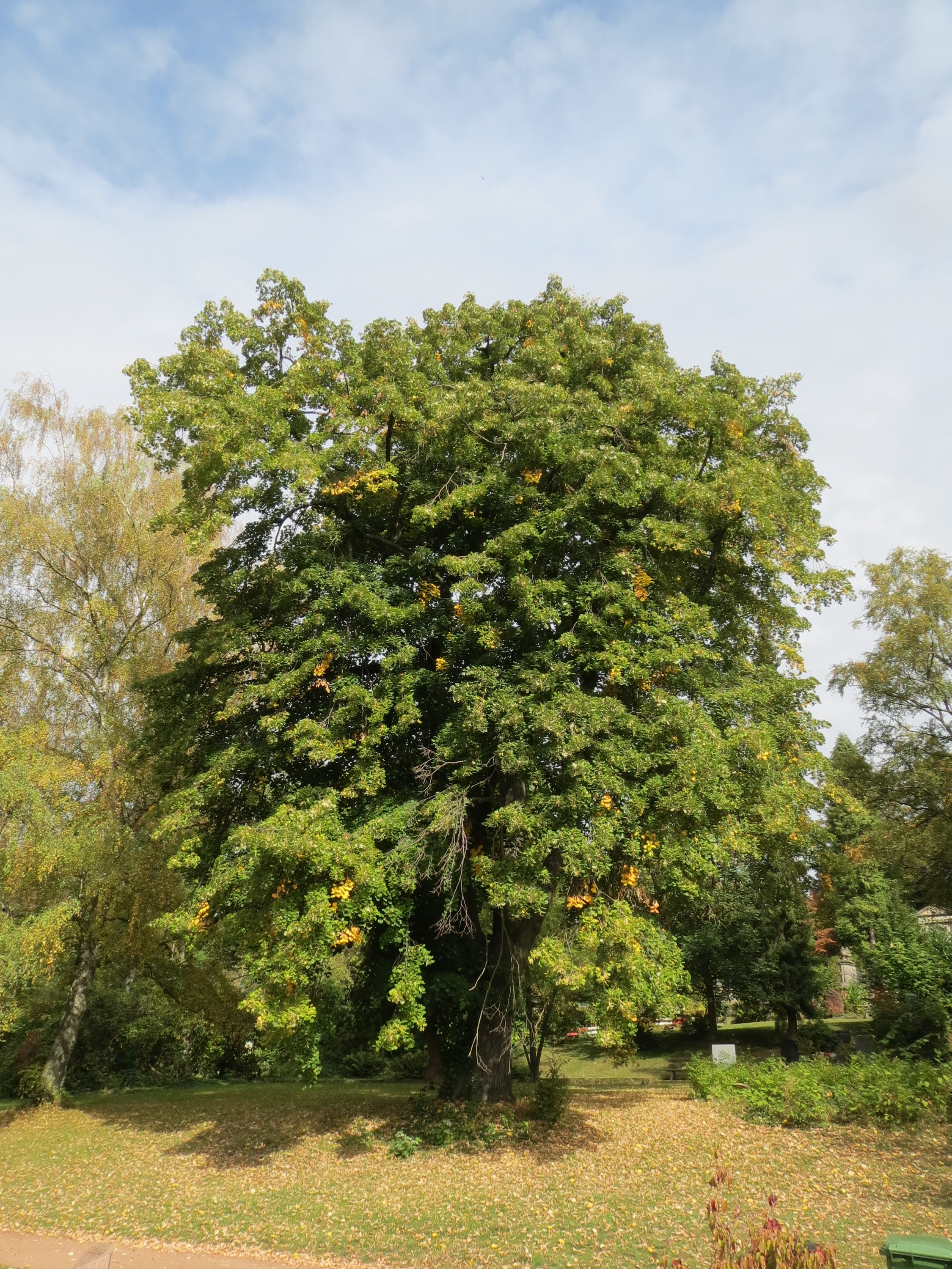 Winter-Linde (Tilia cordata) am Friedhof St. Johann (Saarbrücken)